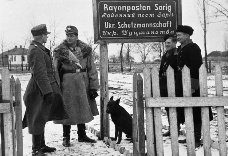 Hauptwachtm[eister] d[er] Gend[amerie] Volkmann, Führer des Rayonpostens Sarig zeigt seinem Kommandeur Htm. d[er] Gend[amerie] Grosch, die durch seine Initiative aus dem Nichts geschaffene Anlage des Rayonpostens Sarig.